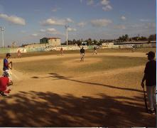 liga municipal